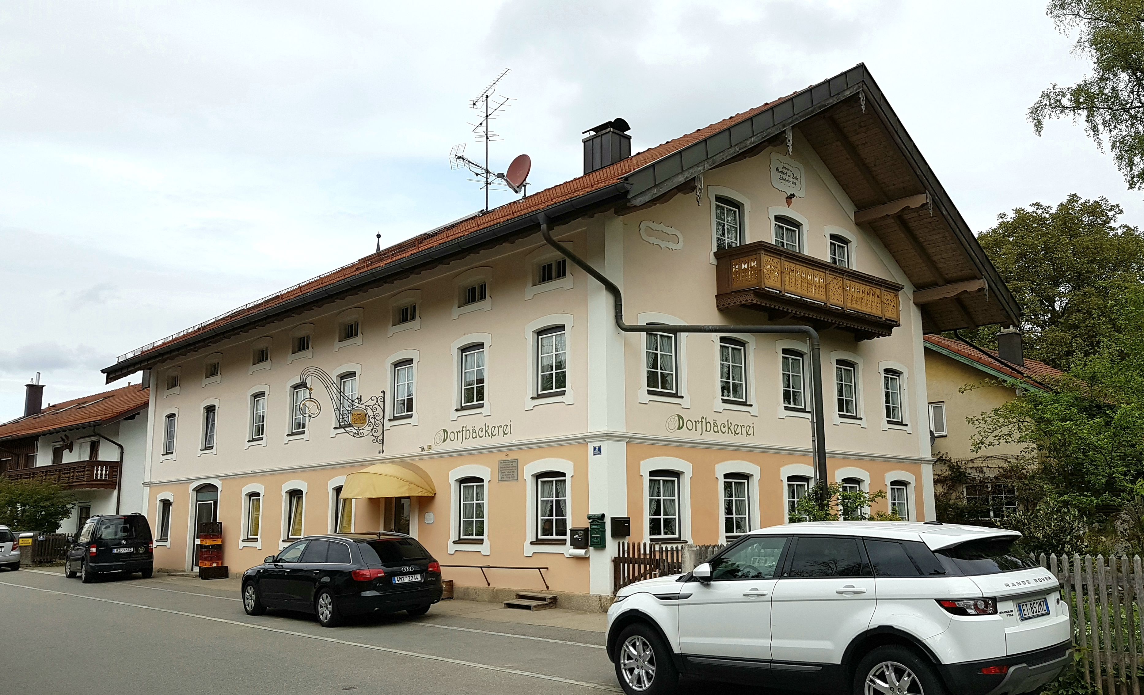 Sauerlach, Von-Aychstetter-Str 2, Dorfbäckerei, Heimatstilbau (wohl um/nach 1900).